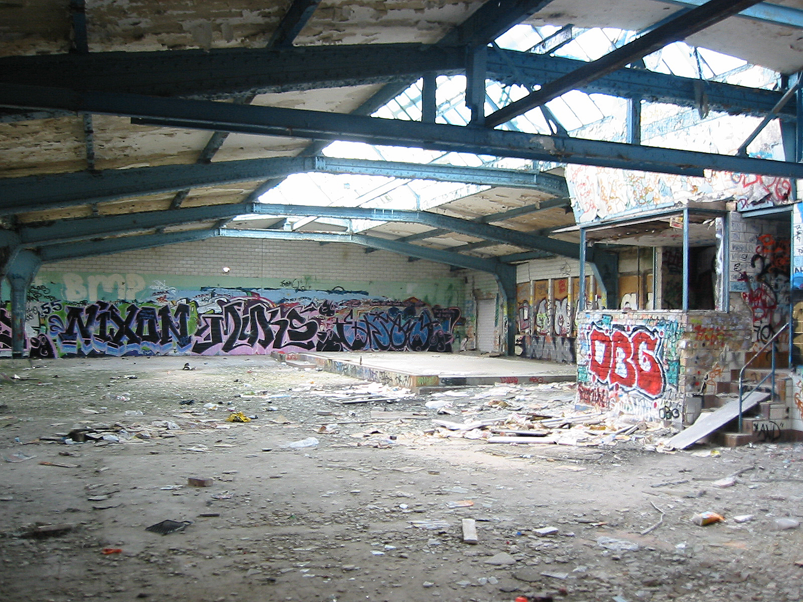 Flaschenturm Berlin-Stralau